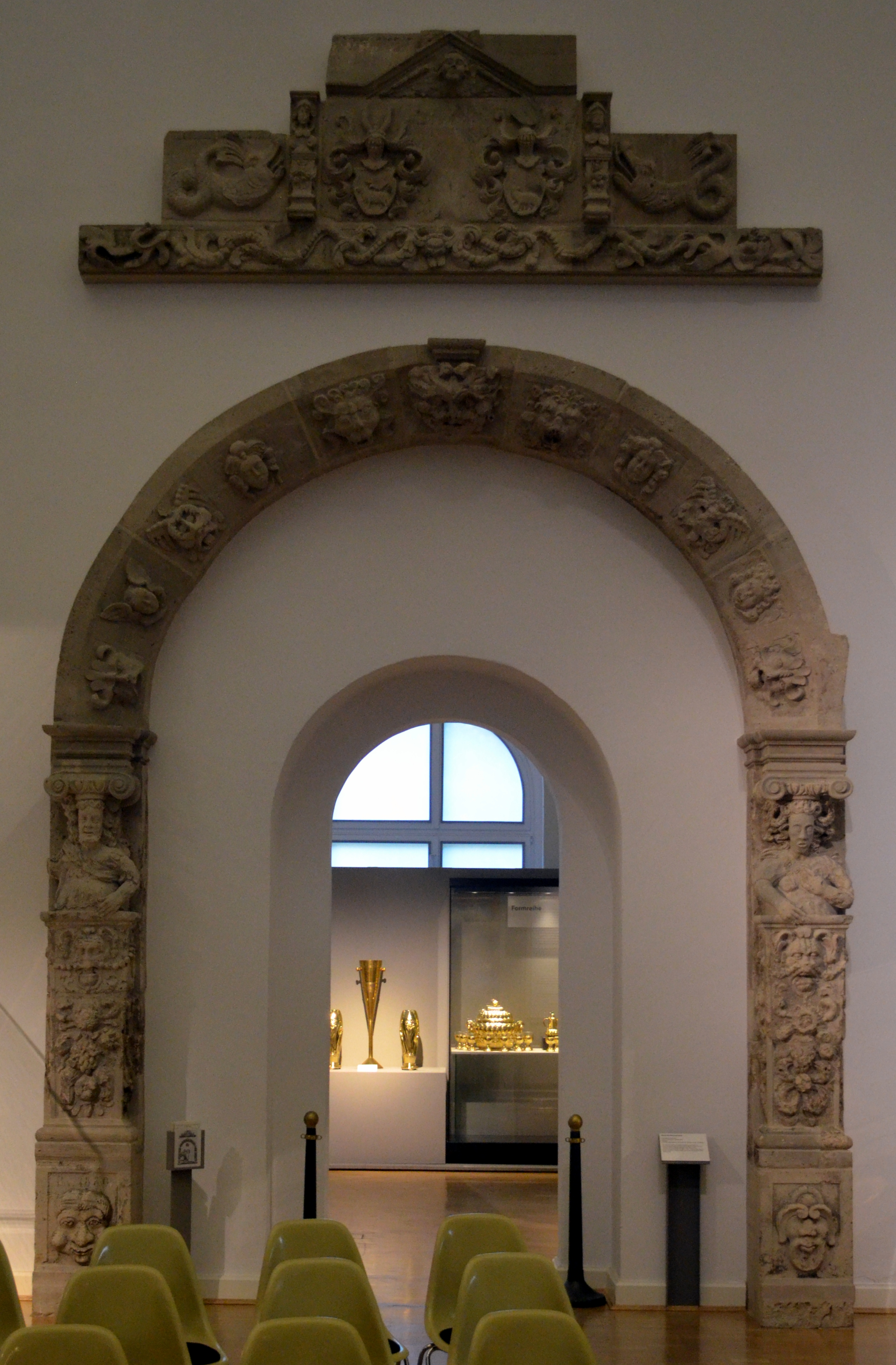 Braunschweig, Städtisches Museum: Das „Mummetor“, die Überreste eines Portals, das wohl um 1708 entstand und von den damaligen Eigentümern des Mummehauses, Bäckerklint 4, dort eingebaut wurde. Im Zweiten Weltkrieg wurde das Haus schwer beschädigt und nach Kriegsende abgerissen. Dies ist der einzige größere Rest, der gerettet wurde. Seit 1975 im Erdgeschoss des Städtischen Museums verbaut.